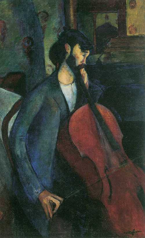 Der Cellistlabel QS:Lde,"Der Cellist"